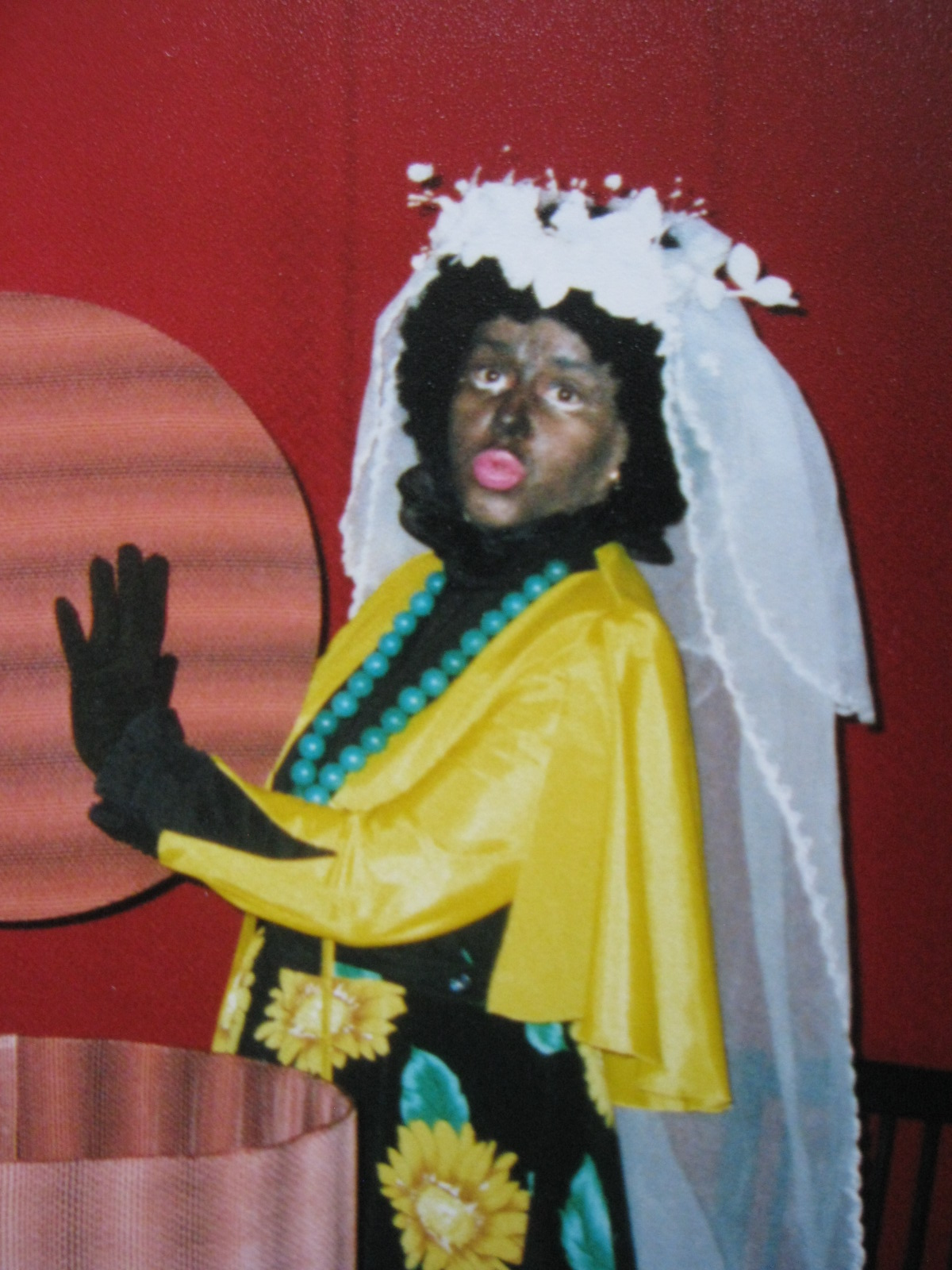 Сцена из спектакля "Идеальная пара" Санкт-Петербургского драматического театра "Патриот" РОСТО. В роли Луизы заслуженная артистка России Татьяна Кудрявцева.